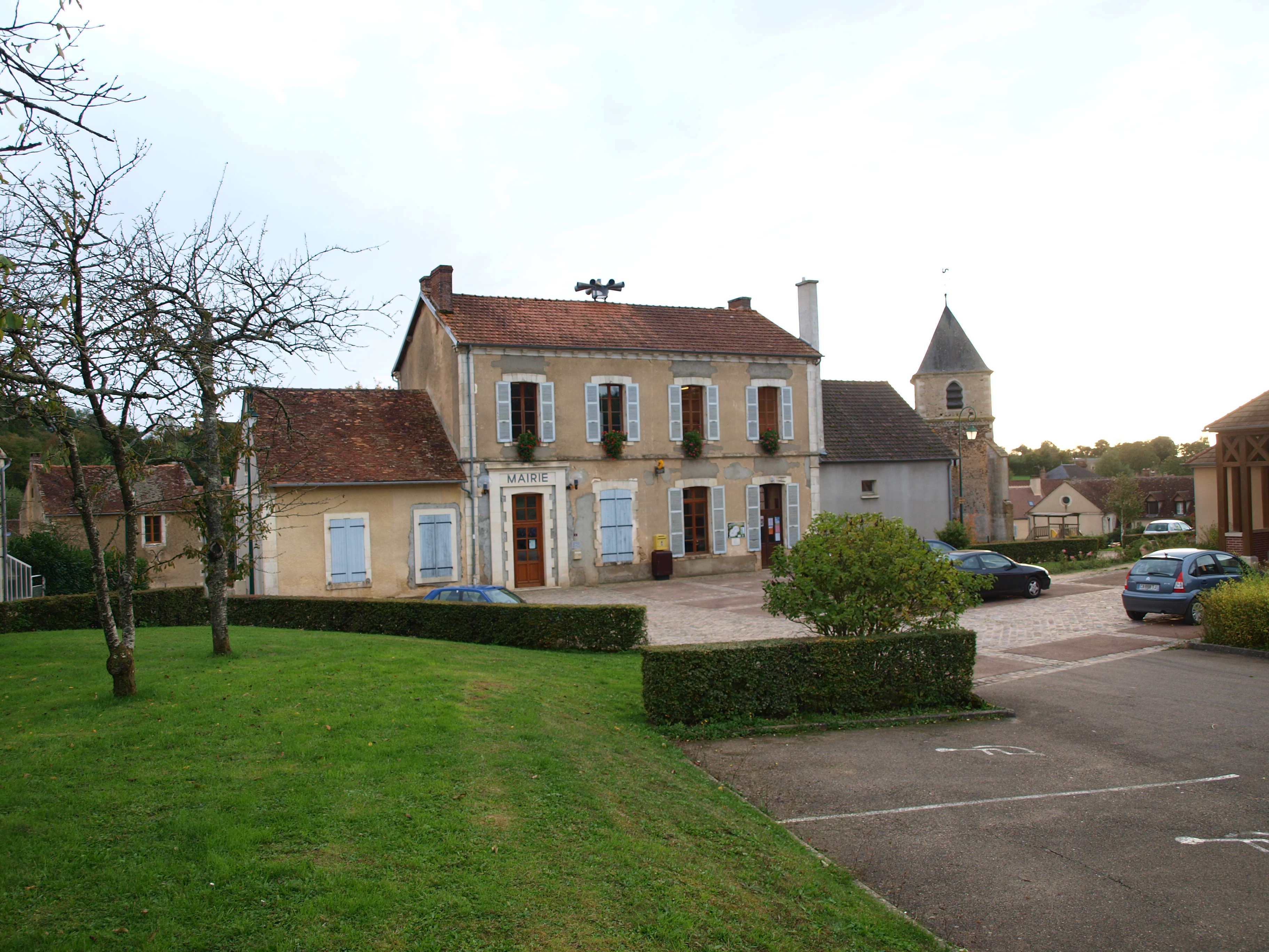 Saints-en-Puisaye (Yonne, France)